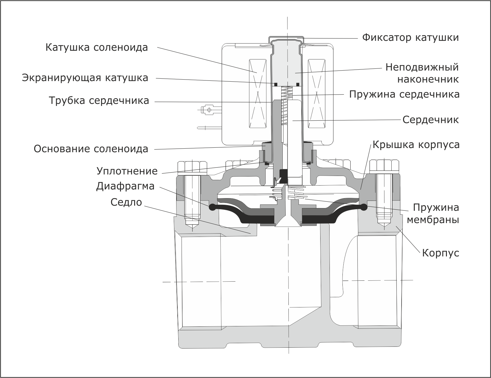 Схема электромагнитного соленоидного клапана (в разрезе)